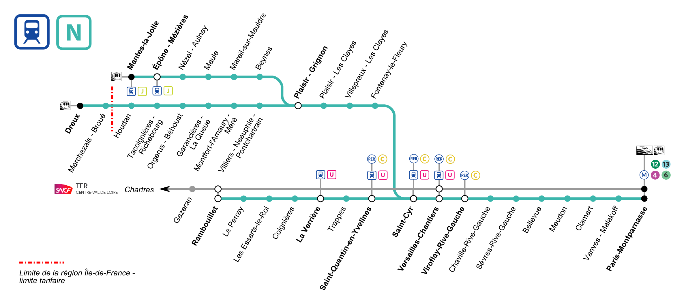 Plan schématique de la ligne N du Transilien avec indication des correspondances (RER, Transilien, métro, tram, autres trains).